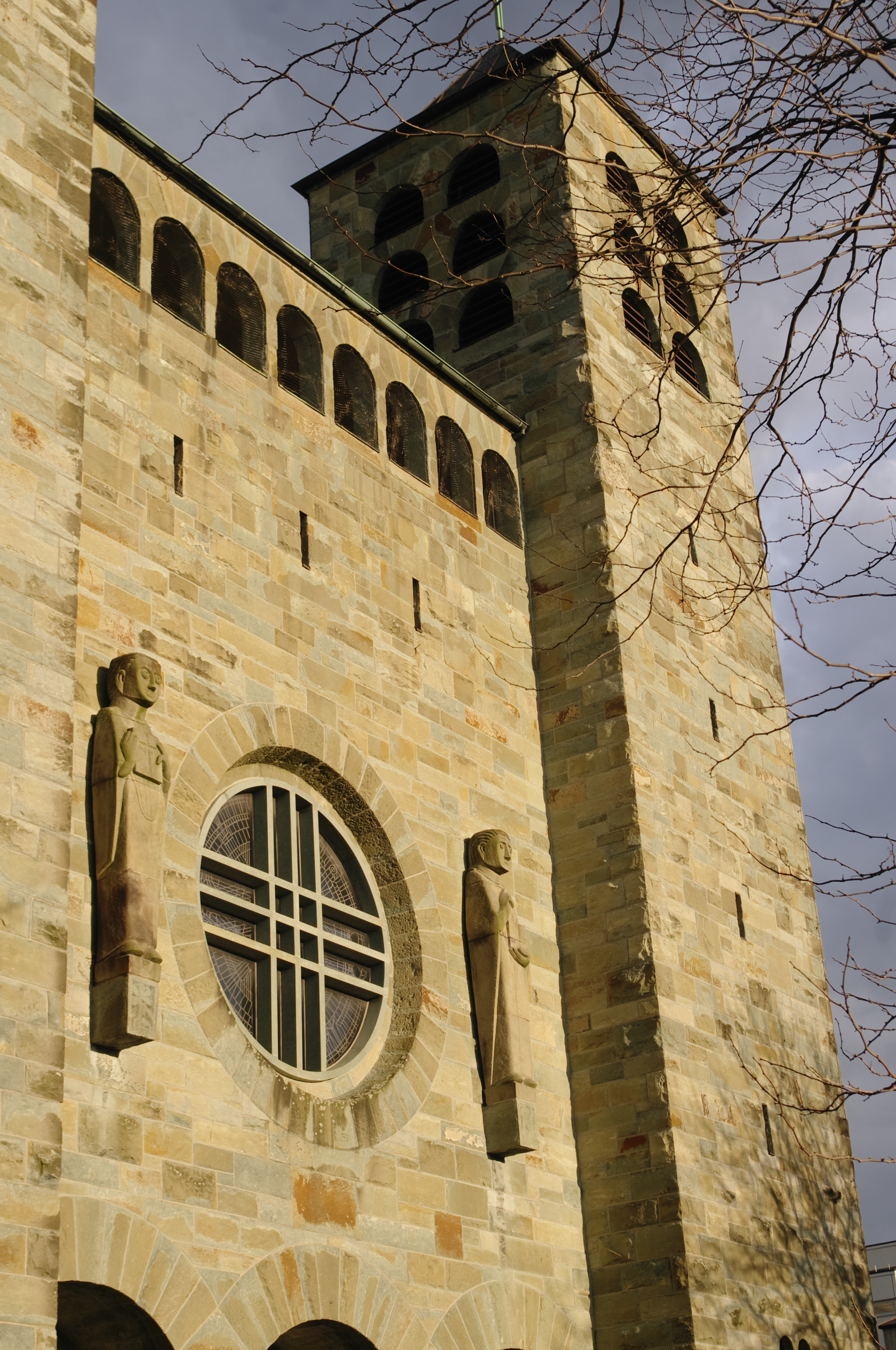 Katharinenkirche Unna mit den Portalskulpturen von Josef Baron